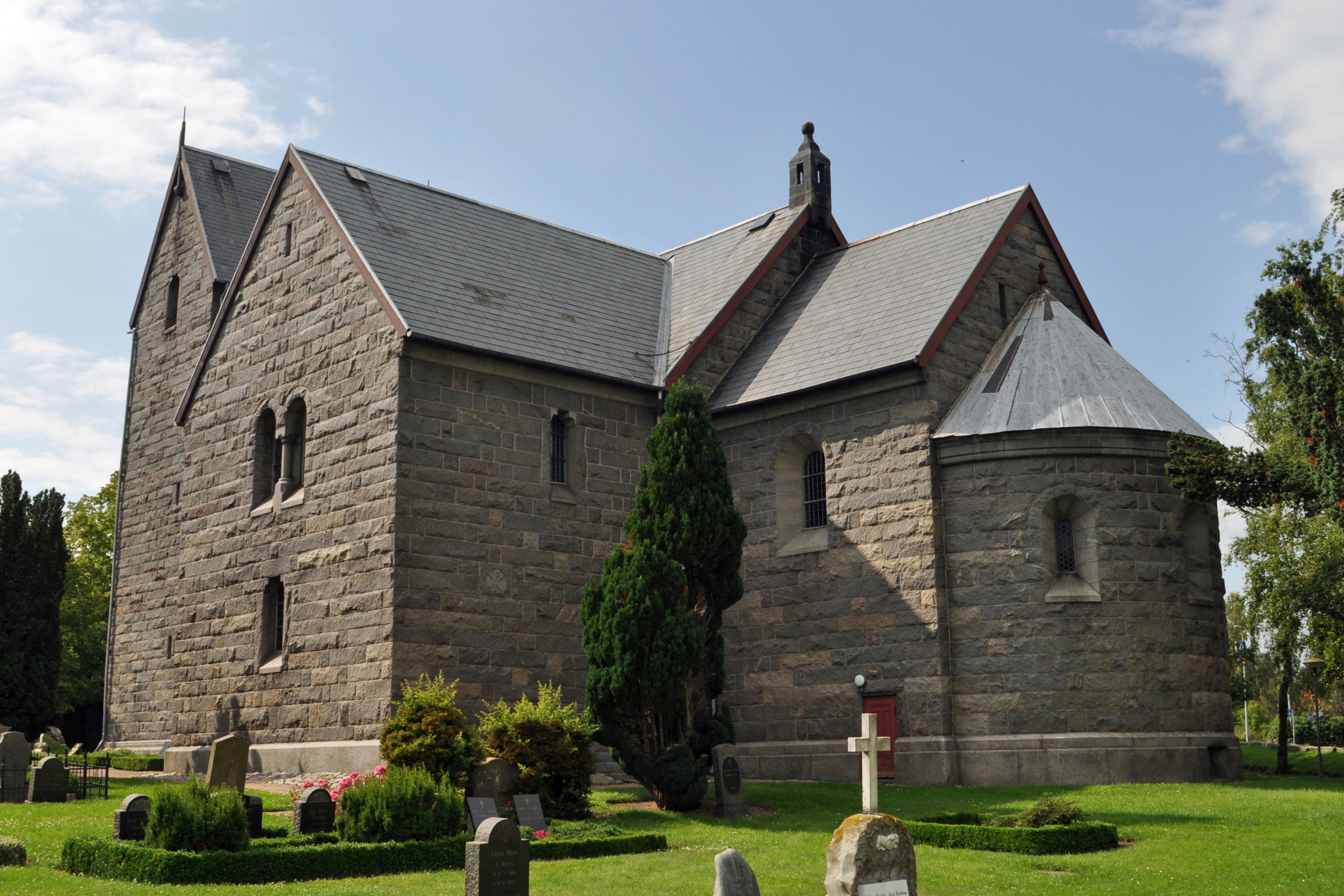 Østermarie Kirche, Bornholm (2012-07-11), by Klugschnacker in Wikipedia (25)